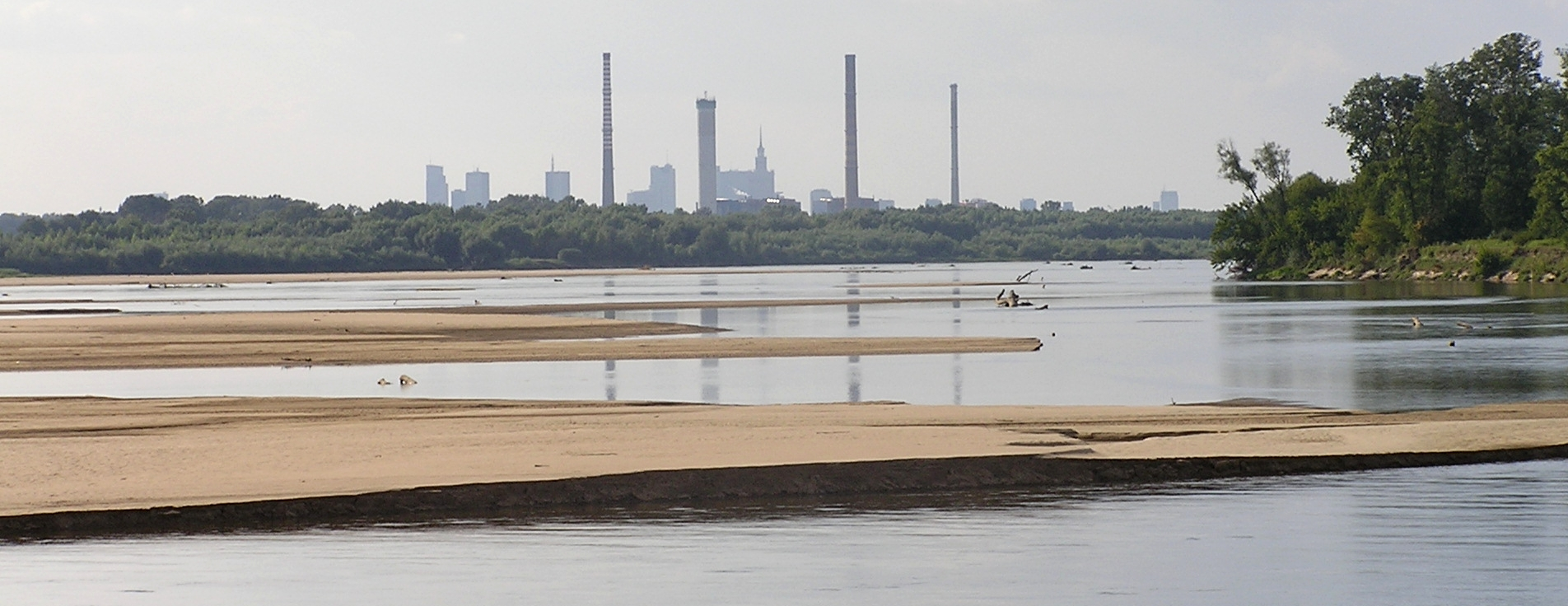 Widok w kierunku centrum Warszawy z Rezerwatu przyrody Wyspy Zawadowskie. Zdjęcie wykonano z prawego brzegu Wisły przy niskim poziomie wody.